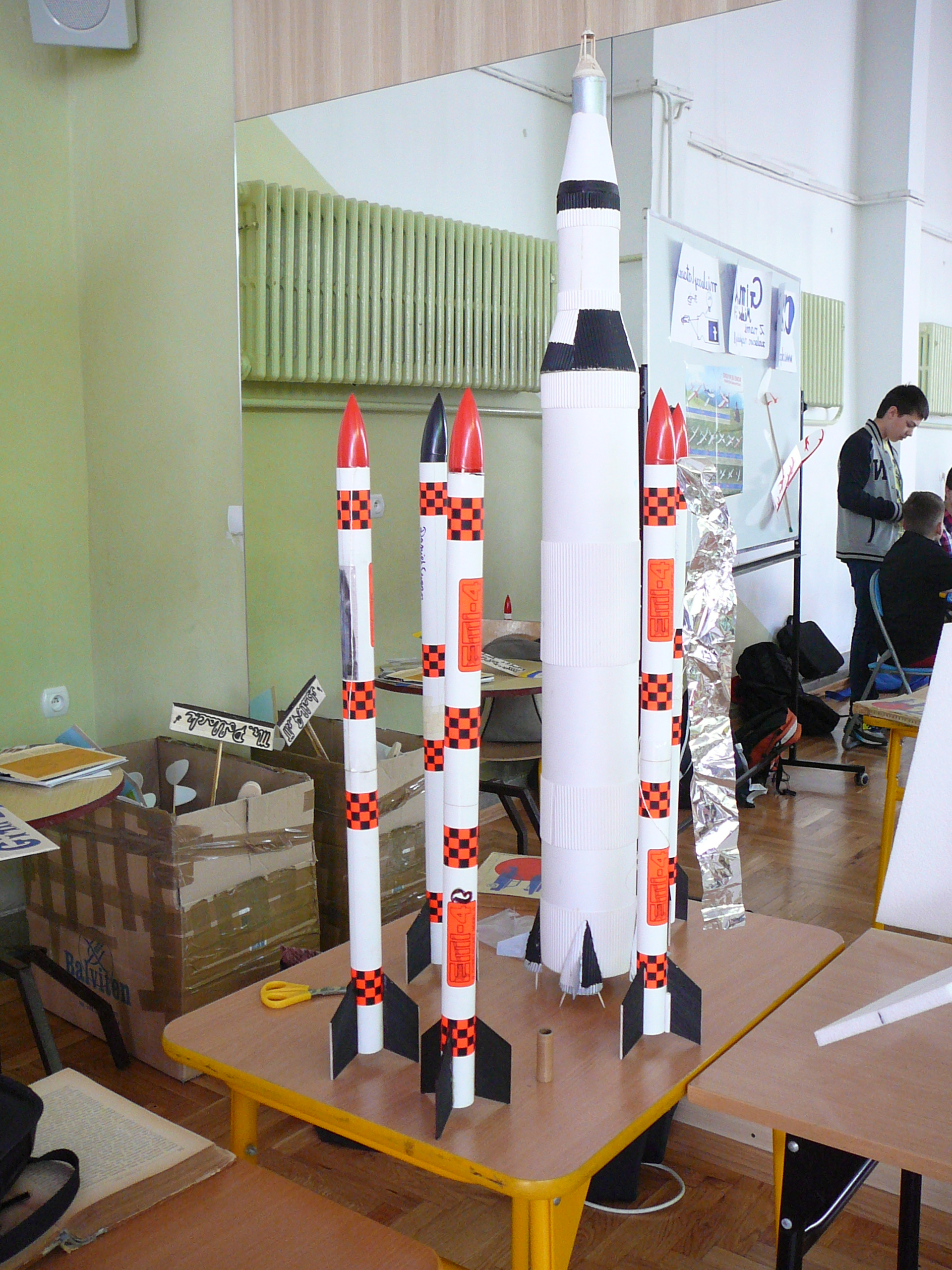 Modele latające rakiet zbudowane z kartonu, z plastikowymi głowicami i balsowymi statecznikami. Największy- model szkoleniowy Saturn IB SA-205. Gimnazjum nr 2 w Mielcu, Bardzo Kolorowy Festiwal Artystyczno-Naukowy, 21 marca 2014